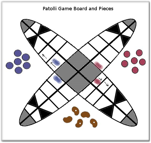 Patolli Board